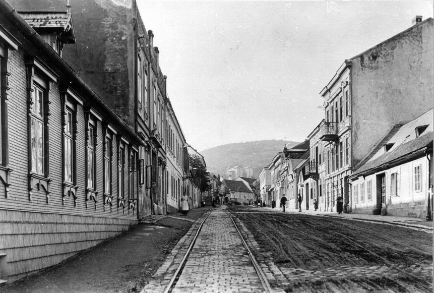 Unbefestigte Straße mit teilweiser Pflasterung in der Hietzinger Hauptstraße, vor 1908